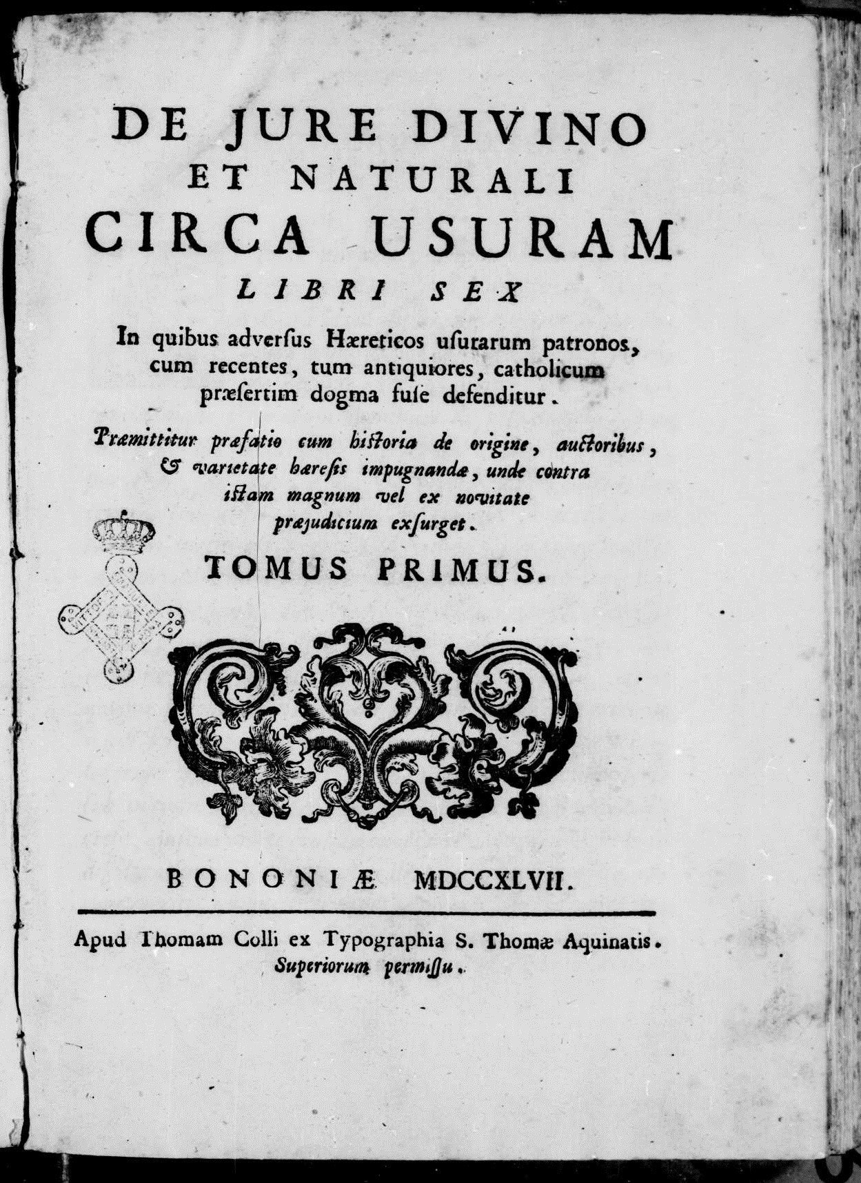 Frontespizio